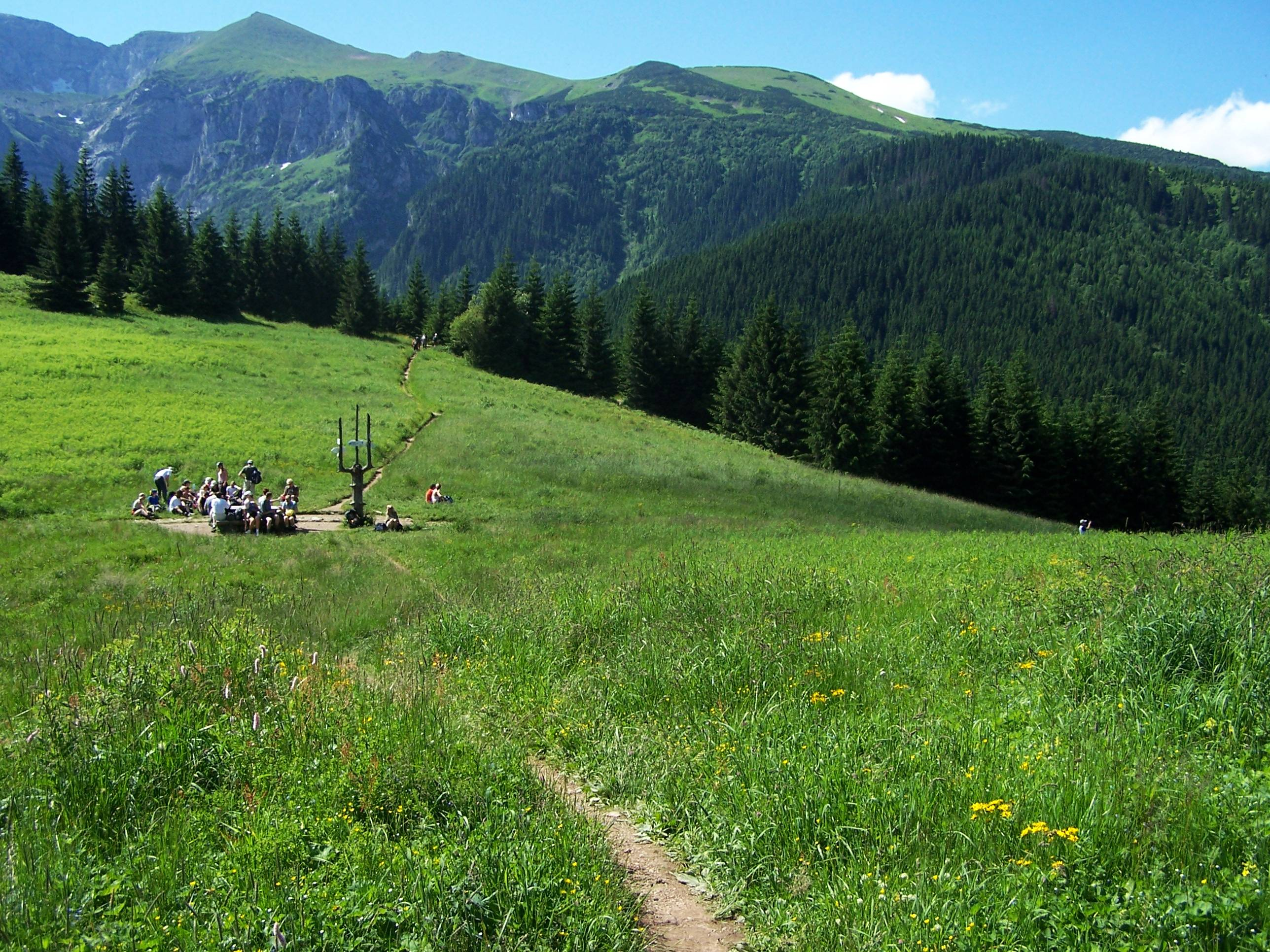 Przysłop Miętusi (Tatra Mountains)